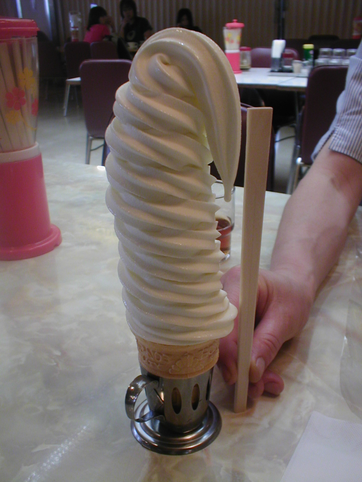 September 28,2004